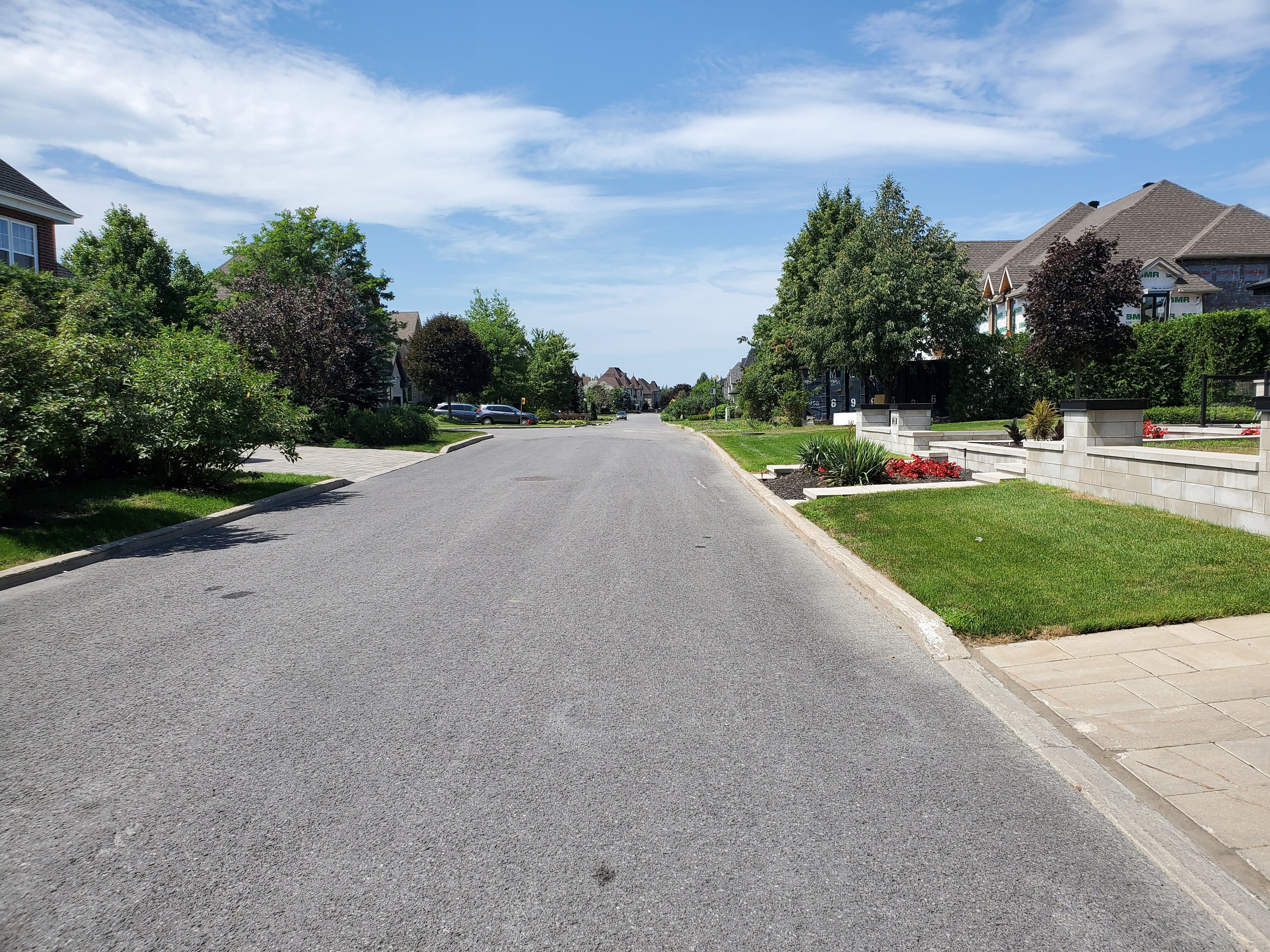 Vue de la rue Olivier-Morel à l'Île aux Lièvres, Carignan (QC) en fin juillet 2020.